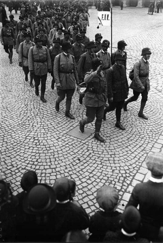 Aufmarsch der oesterr. Heimwehren in Wiener Neustadt.